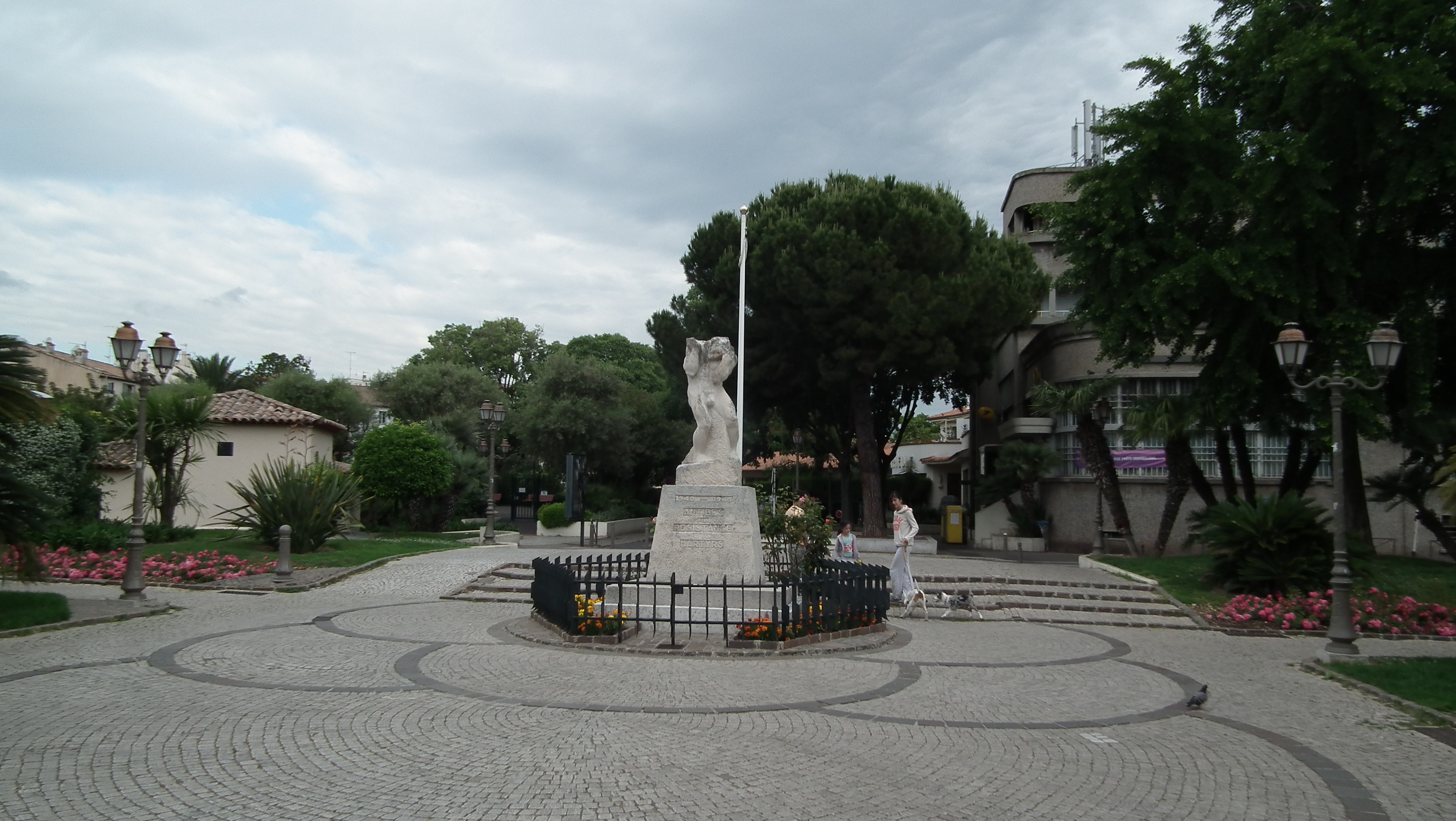 героям сопротивления